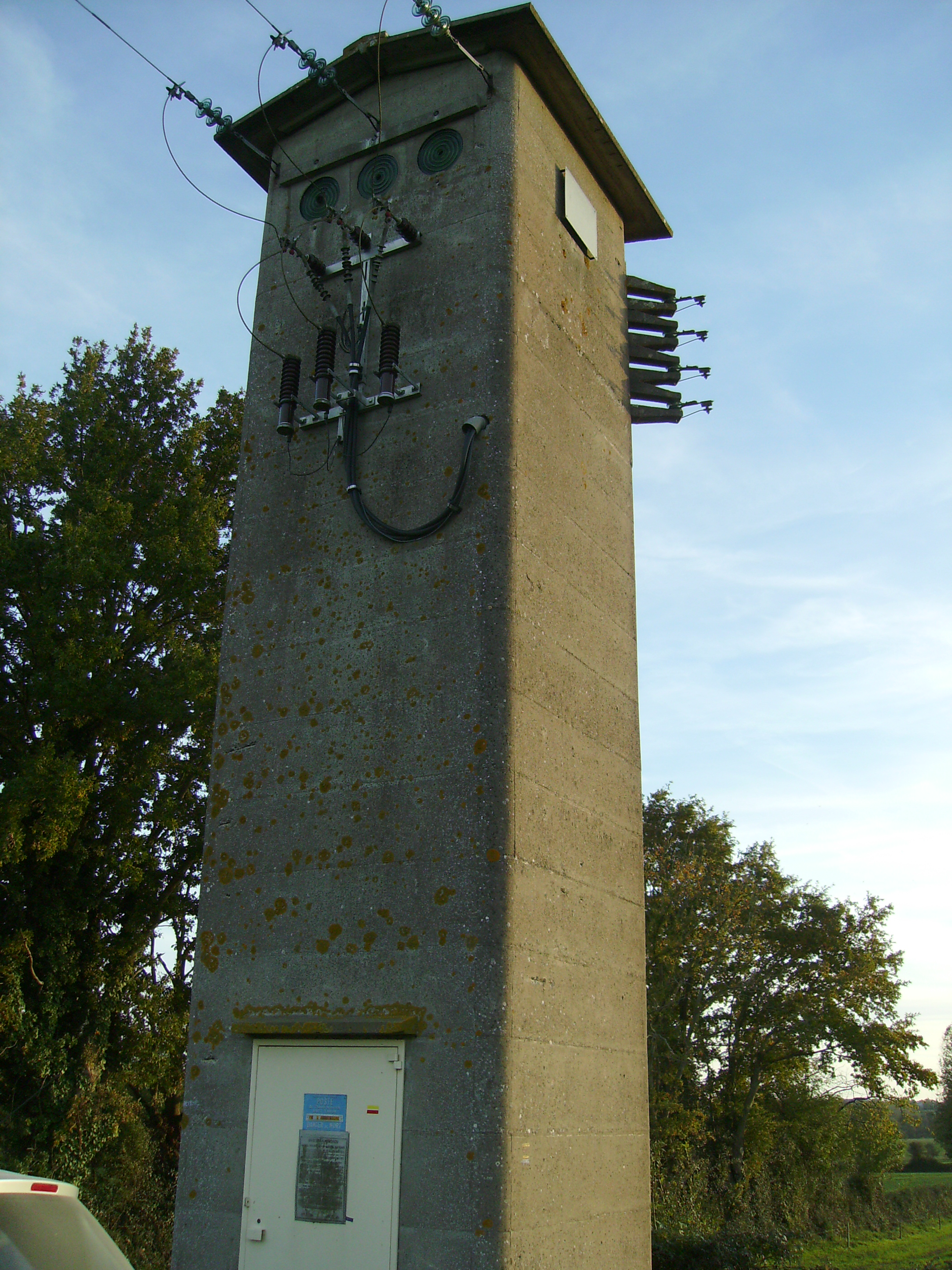 Photographie d'un poste électrique construit par Garczynski Traploir, à Montournais (Vendée) au lieu-dit l'Auguinière.